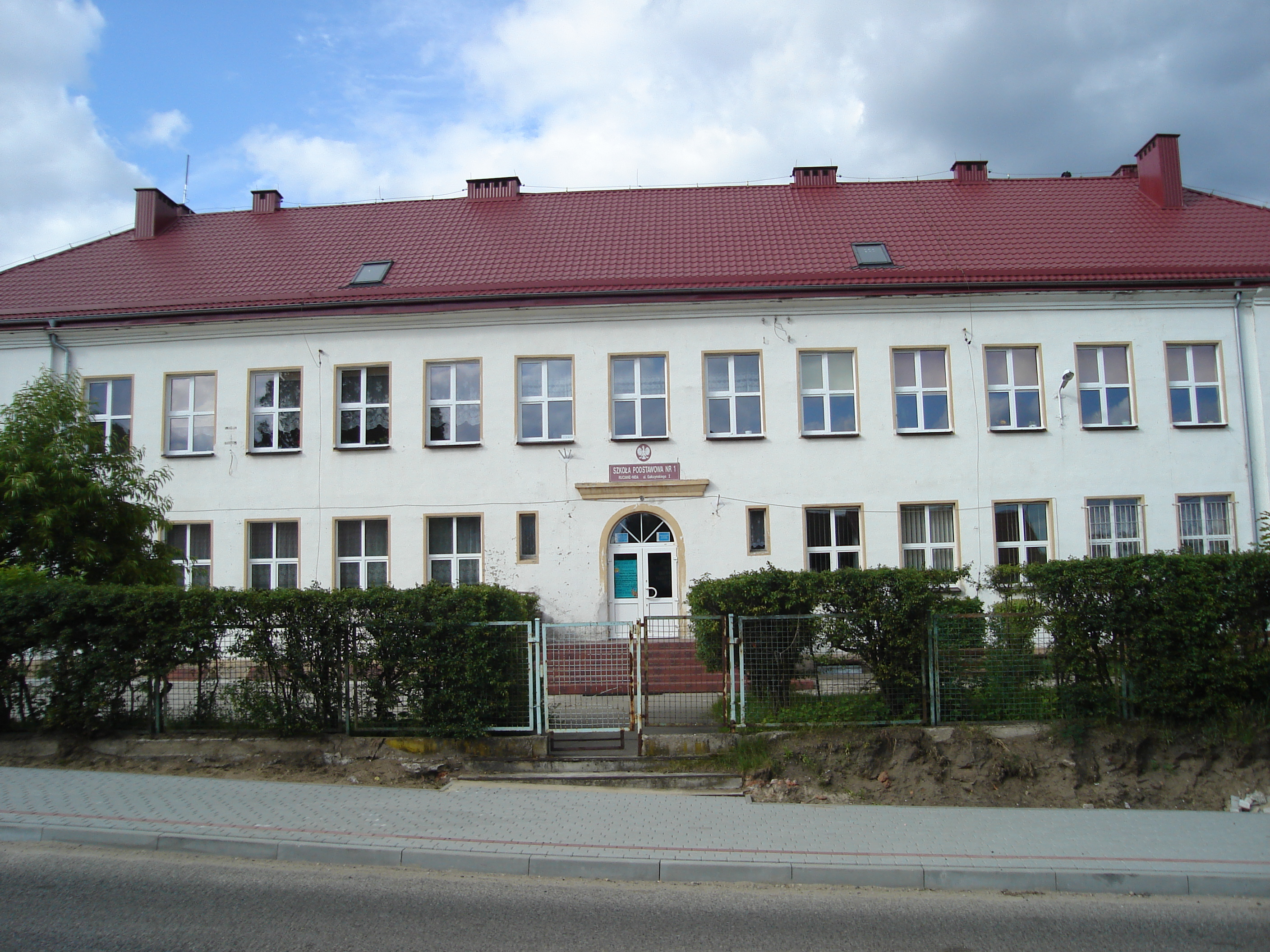 Szkoła podstawowa nr 1 w Rucianym-Nidzie